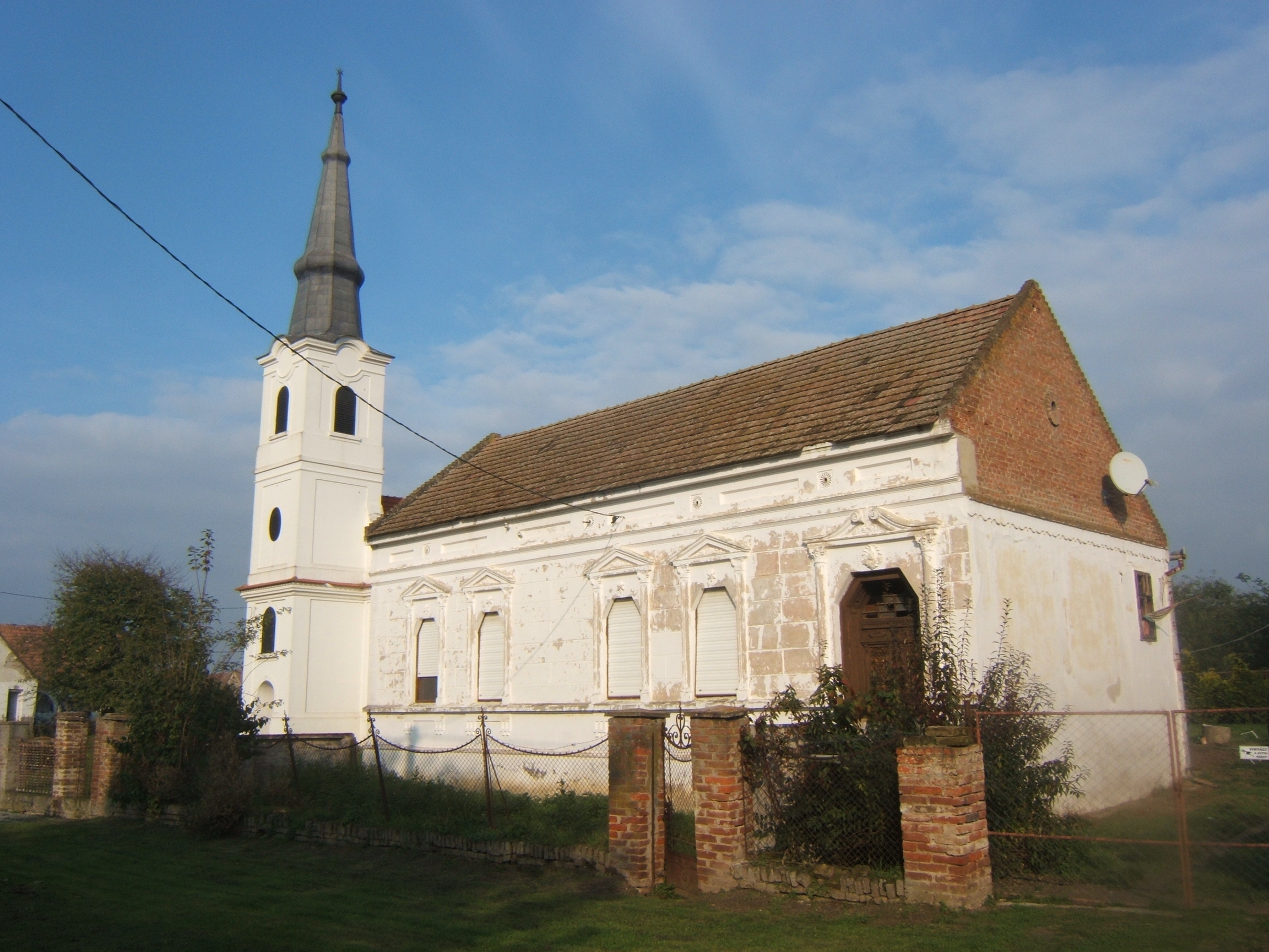 Református templom, klasszicista, 1830. azonosító 1407 (törzsszám 393). - Gordisa, Kossuth Lajos u. 23 /A.